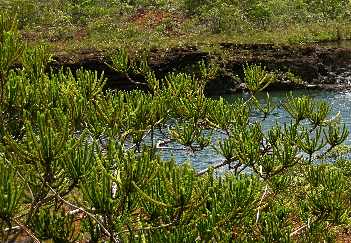 Neocallitropsis pancheri at Chute de la Madeleine, New Caledonia